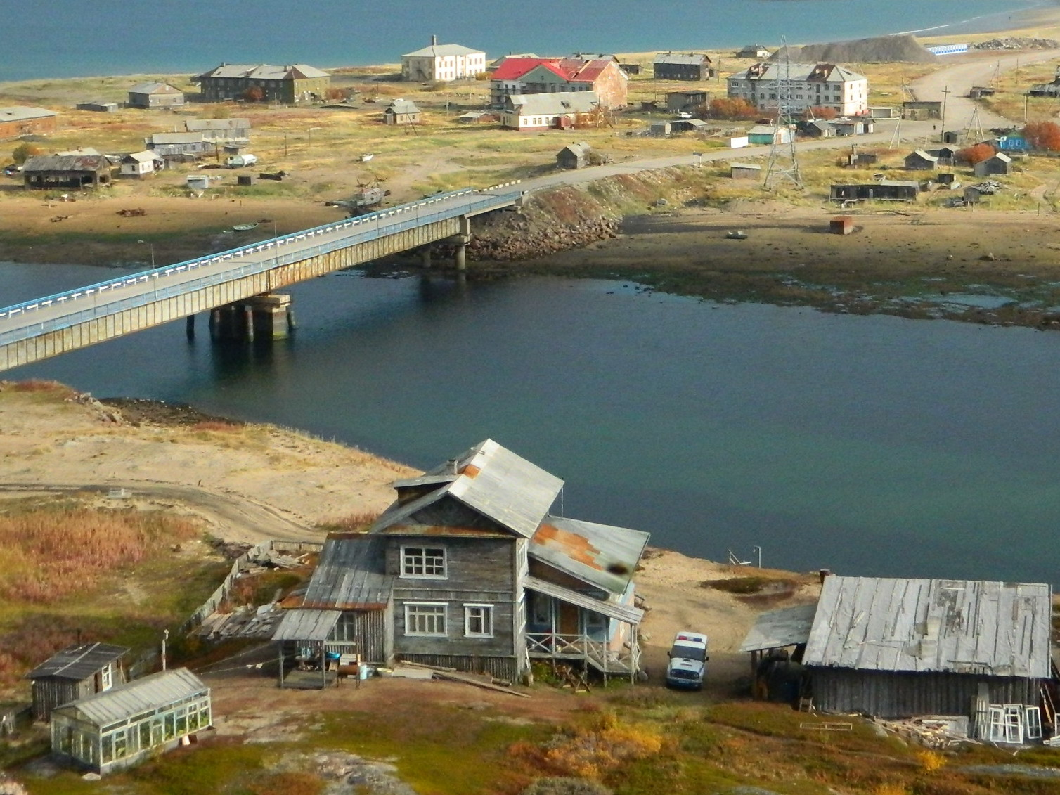 Дом Николая Сергеева. Декорации к фильму "Левиафан".